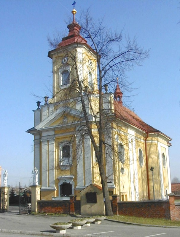 Zabytkowy kościół w Inwałdzie.